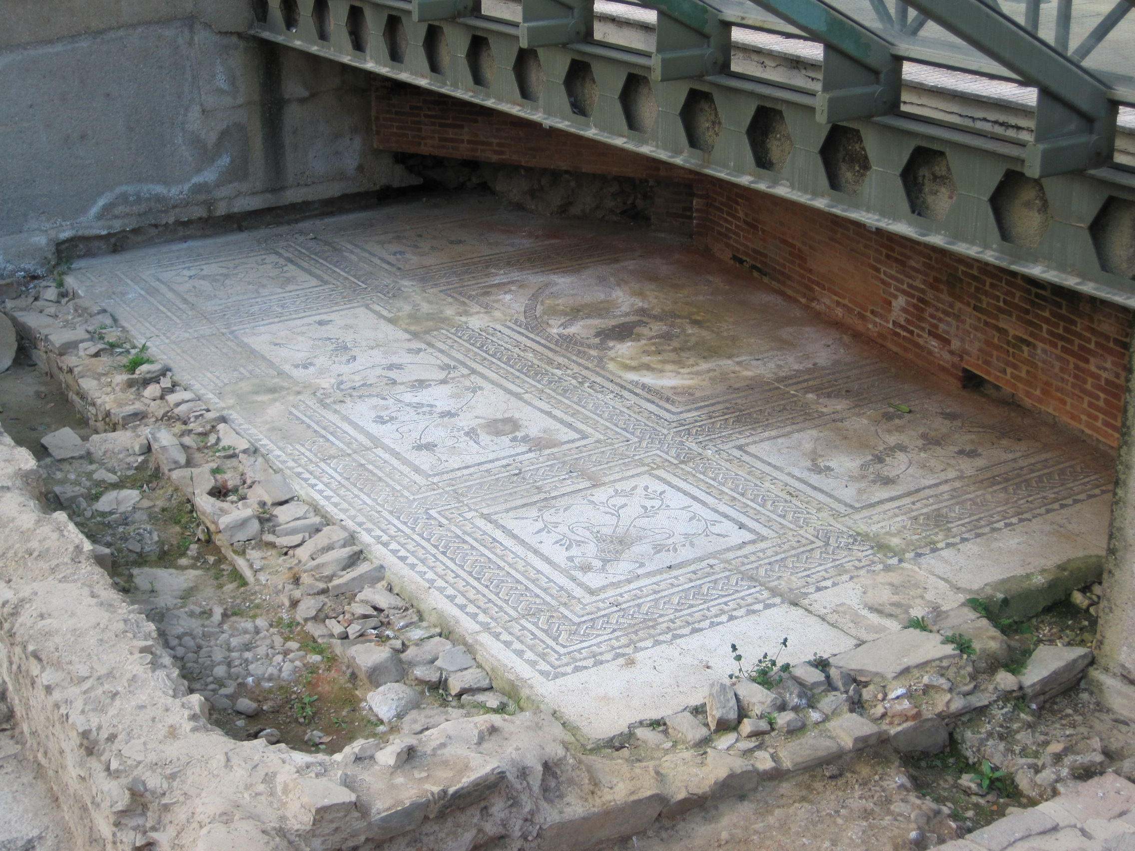 Mosaico y restos romanos de la antigua Asturica Augusta (Astorga, provincia de León) en España.